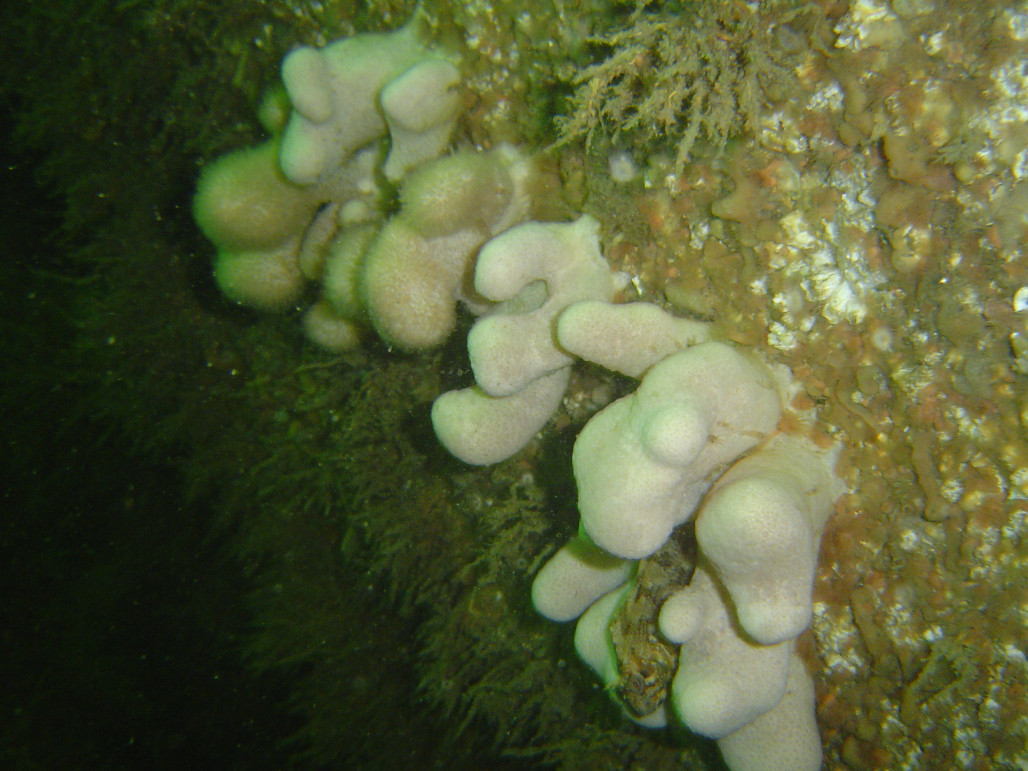 octocoralliaire, Alcyon.